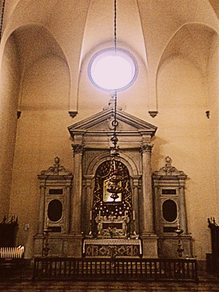 L'altare Capodivacca nella chiesa di San Francesco Grande a Padova